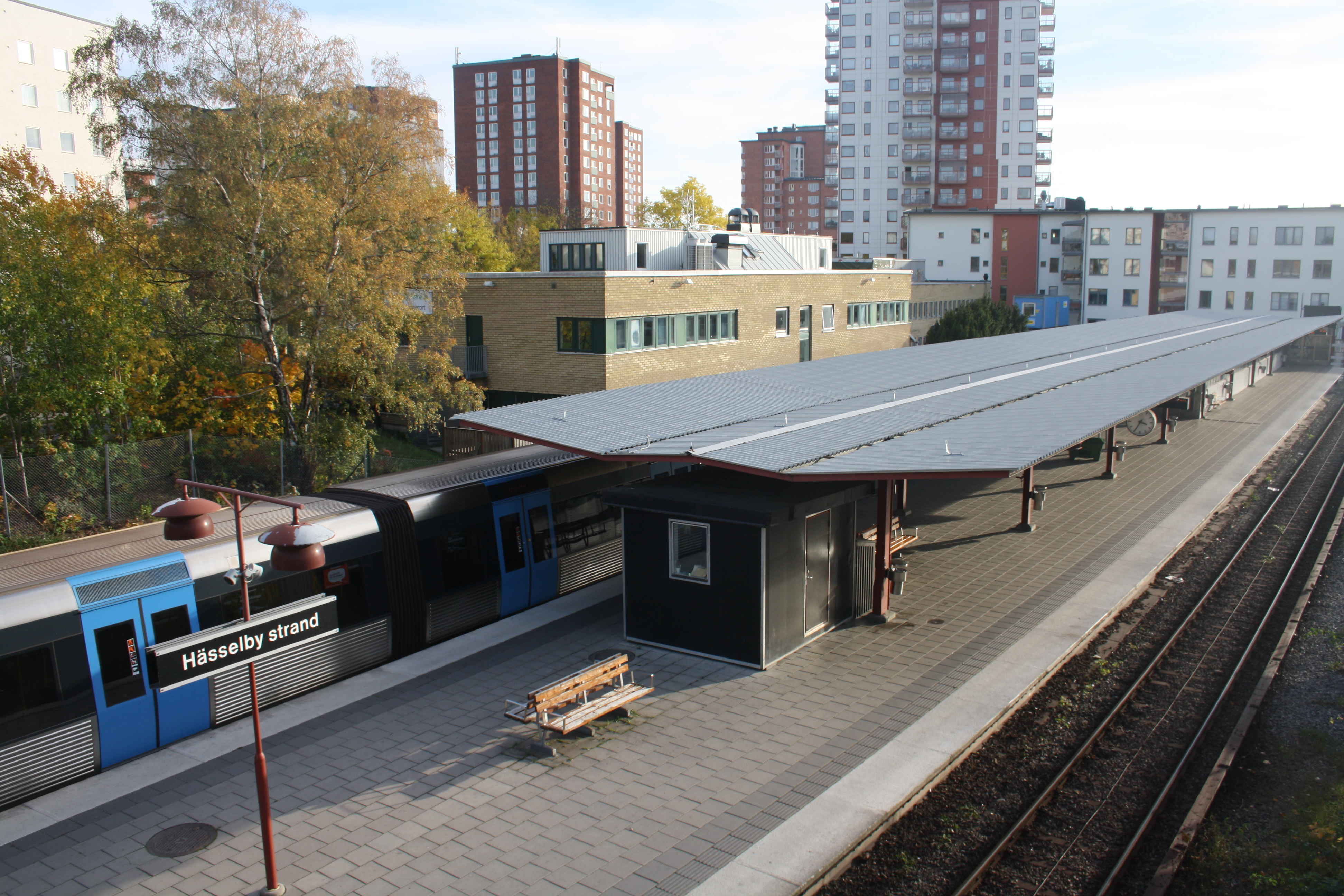 Hässelby strand tunnelbana